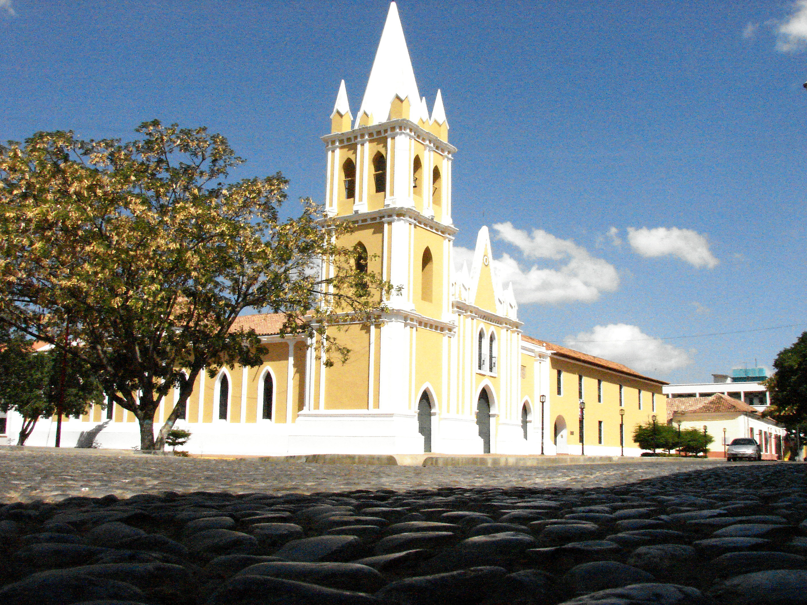 Santa Ana de Coro, Estado Falcón